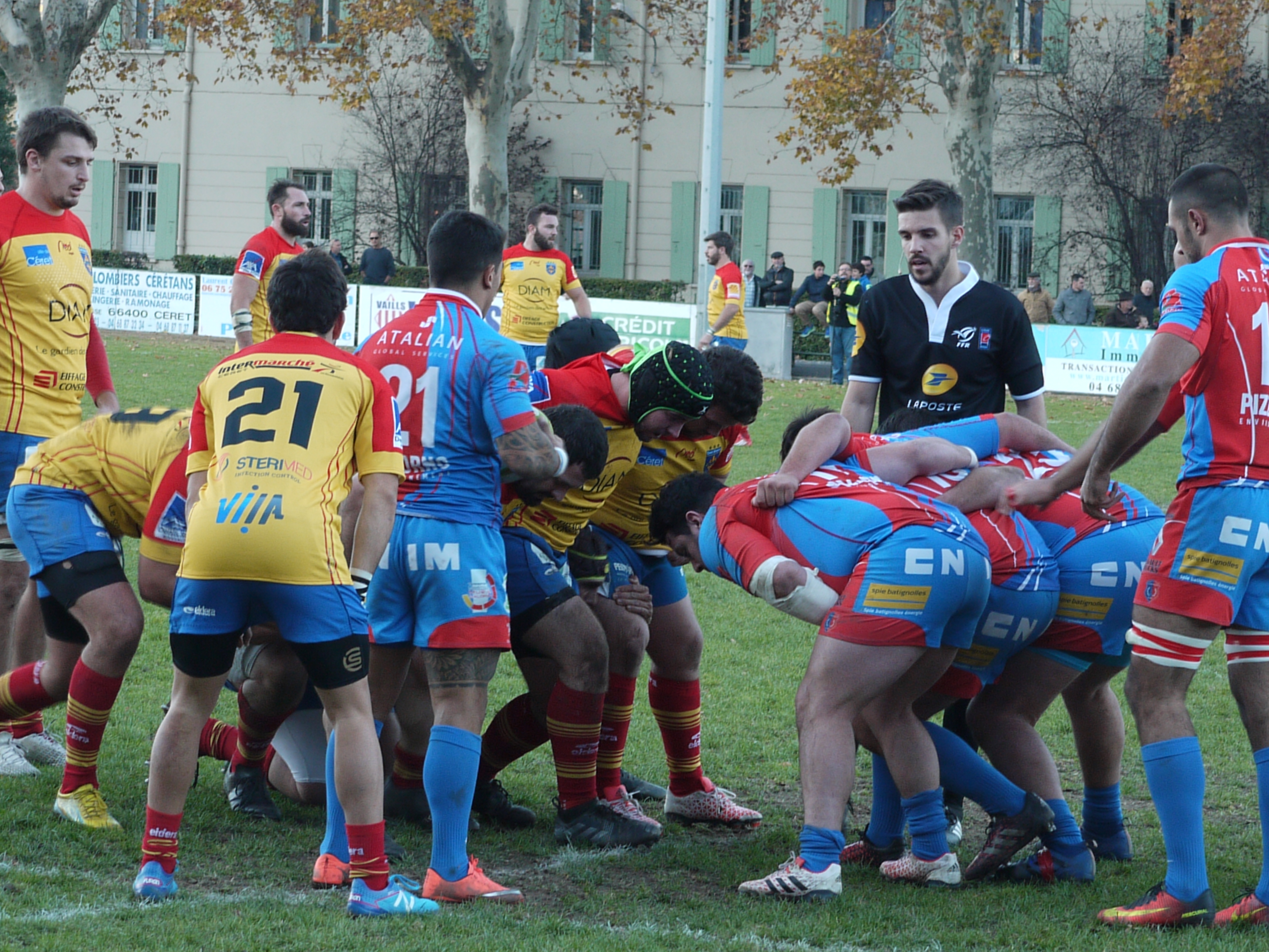 Céret sportif vs US La Seyne au stade Fondecave de Céret le 19 novembre 2017.